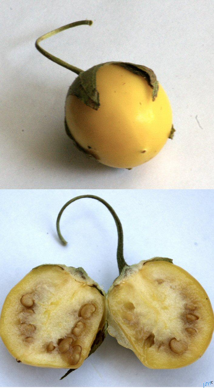 פרי הדודא הבשל